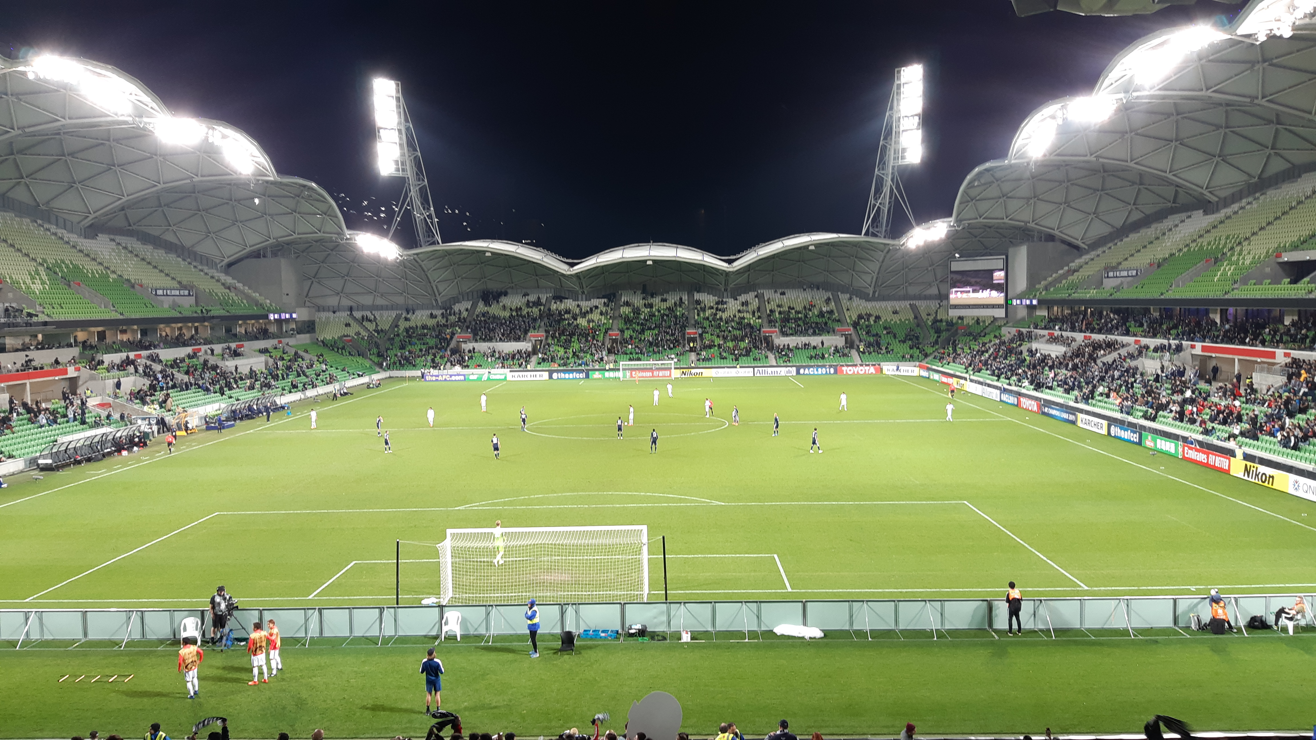 AAMI Park